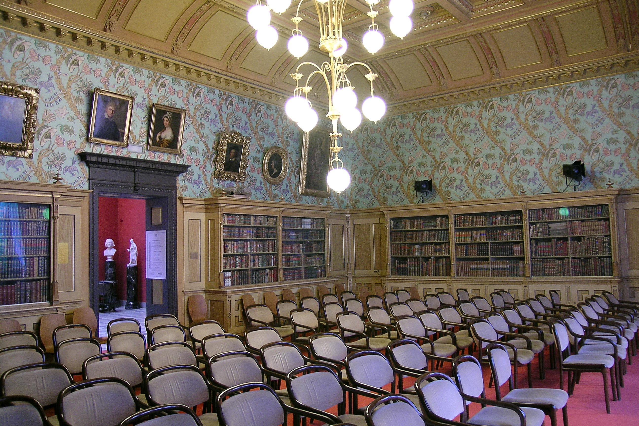 Bibliothek und Saal im Haus Wahnfried, Bayreuth (Zustand bis 2010)